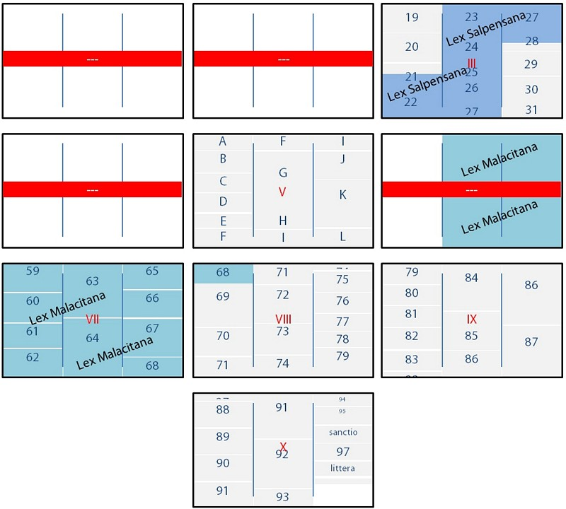 Kapitelanordnung auf den Tafeln der Lex Irnitana